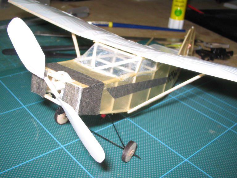 Modèle à l'échelle pistachio d'un Nesmith Couger, envegure 8" poids 4,5g